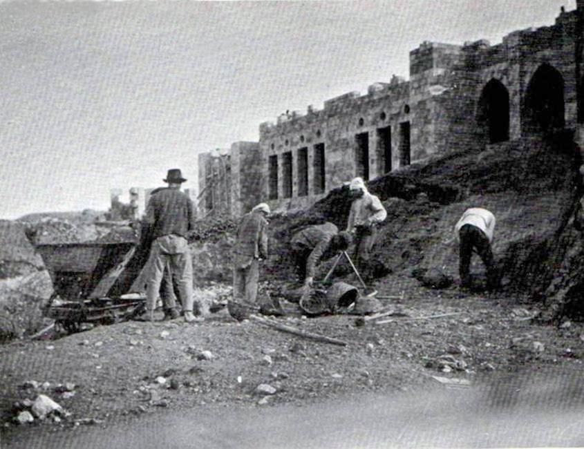 Historical images of Haifa תמונות היסטוריות של חיפה בניית הטכניון בחיפה תמונה משנת 1912